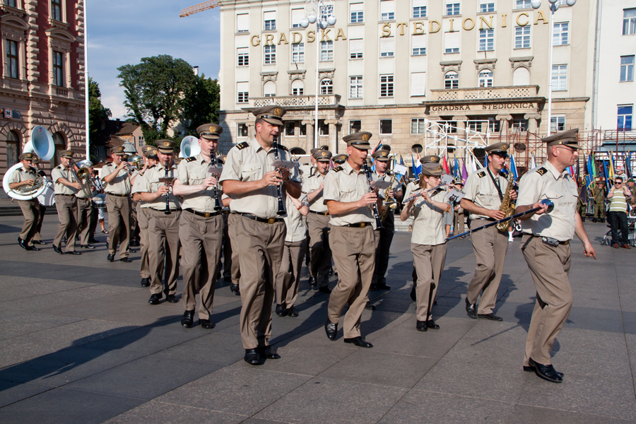 Svečano obilježavanje 20. obljetnice formiranja Oružanih snaga Republike Hrvatske, Dana Oružanih snaga Republike Hrvatske i Dana Hrvatske kopnene vojske